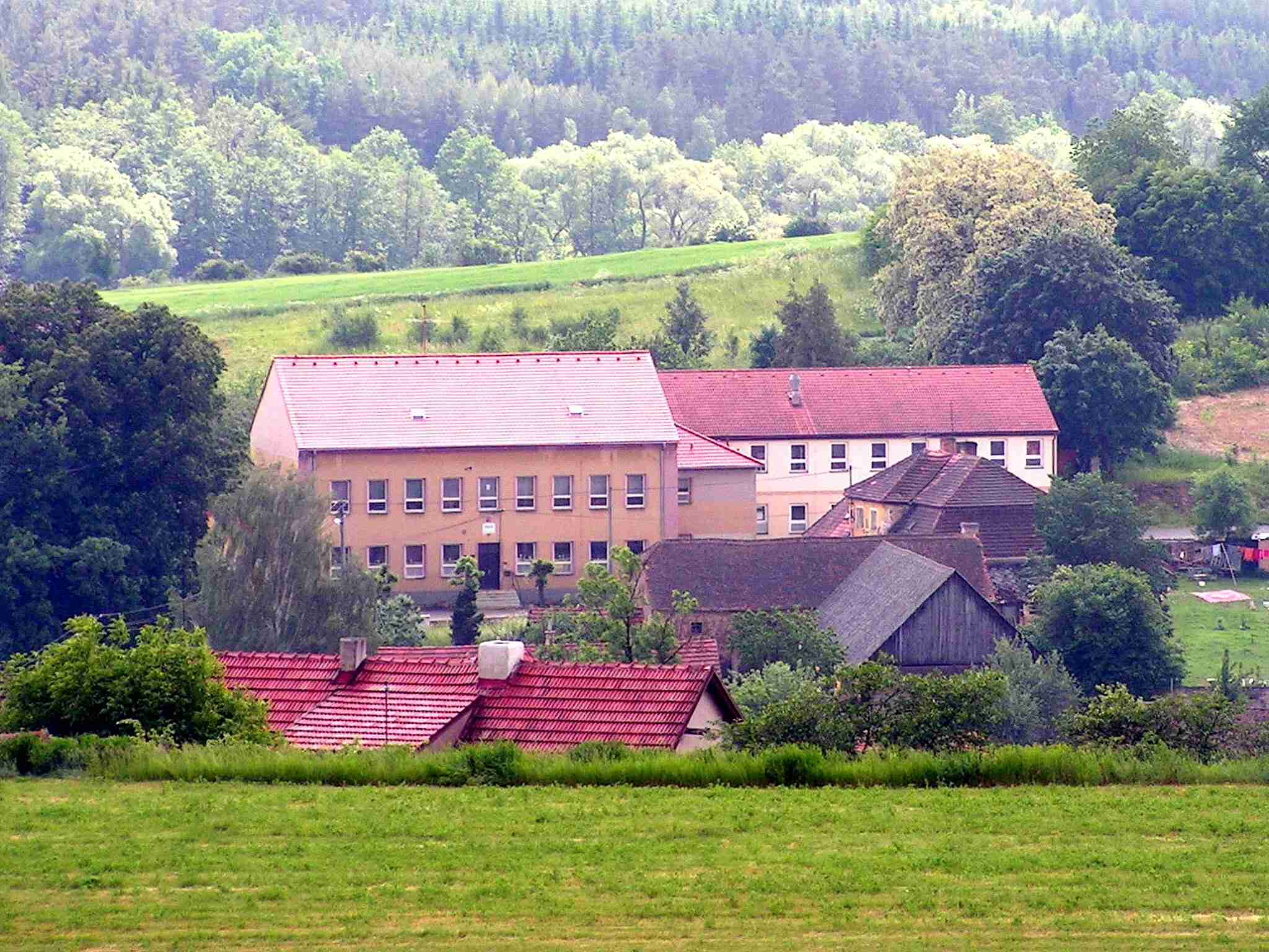 Postavena v 19. stol.